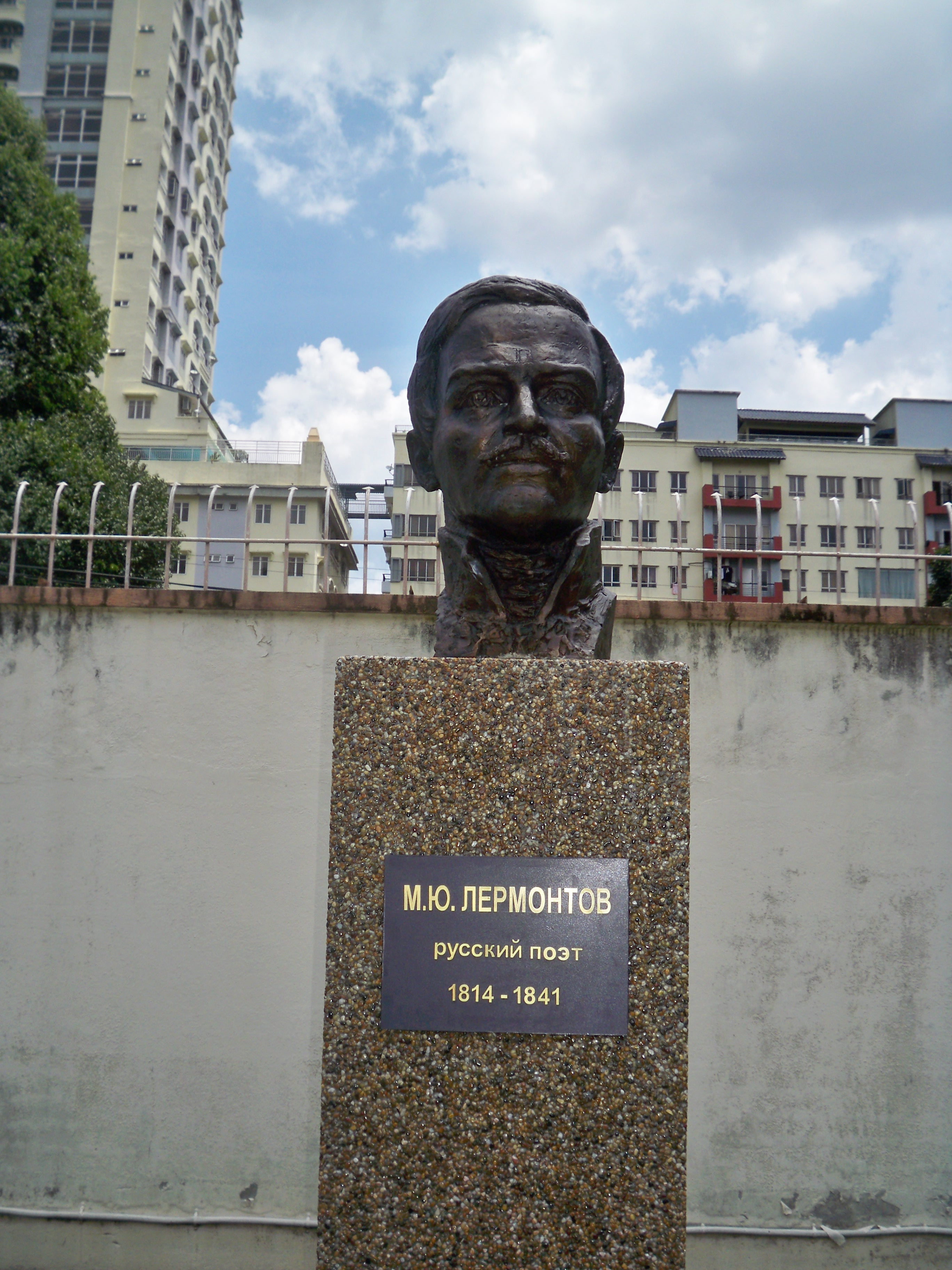 Patung penyair Rusia Lermontov di Kuala Lumpur (pematung Pototsky), 2015